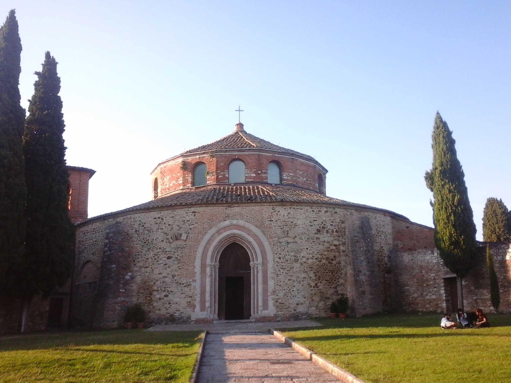 Tempio Sant'Angelo